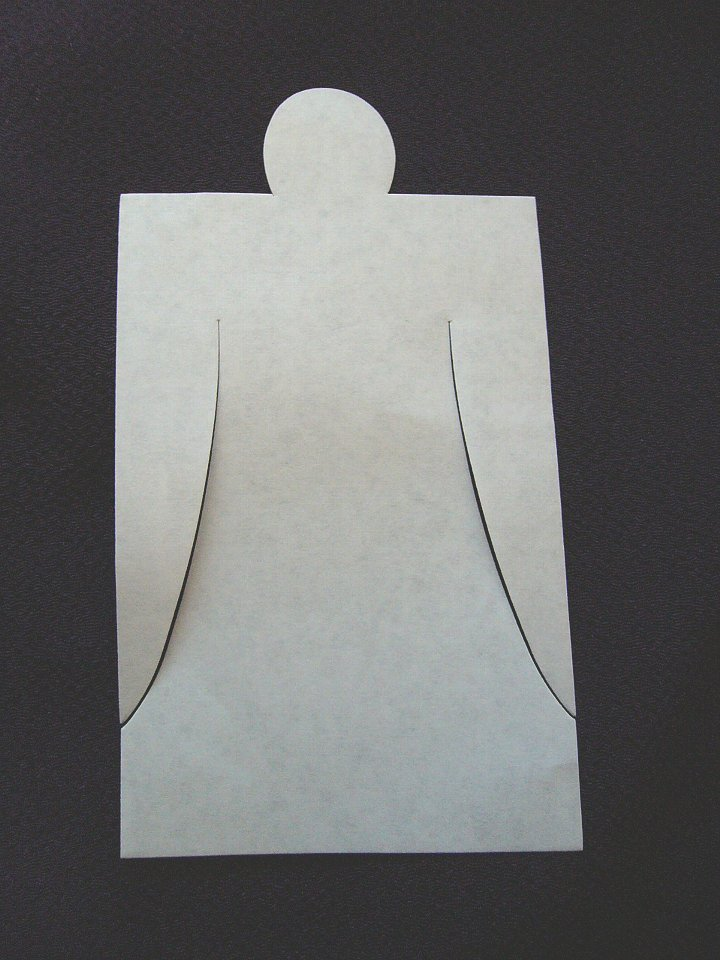 大祓の人形（ひとがた） 記入前